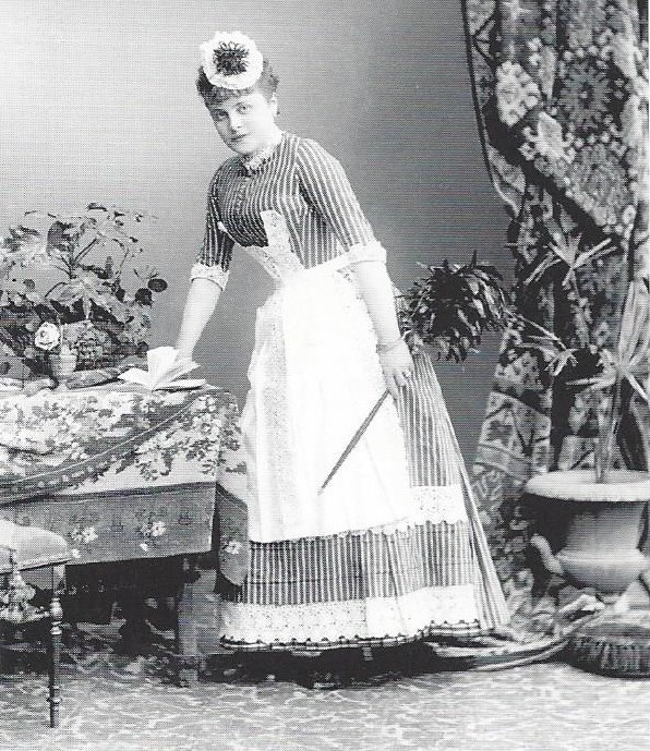 Dienstmädchen Hedwig Sascha in Halle (Saale)